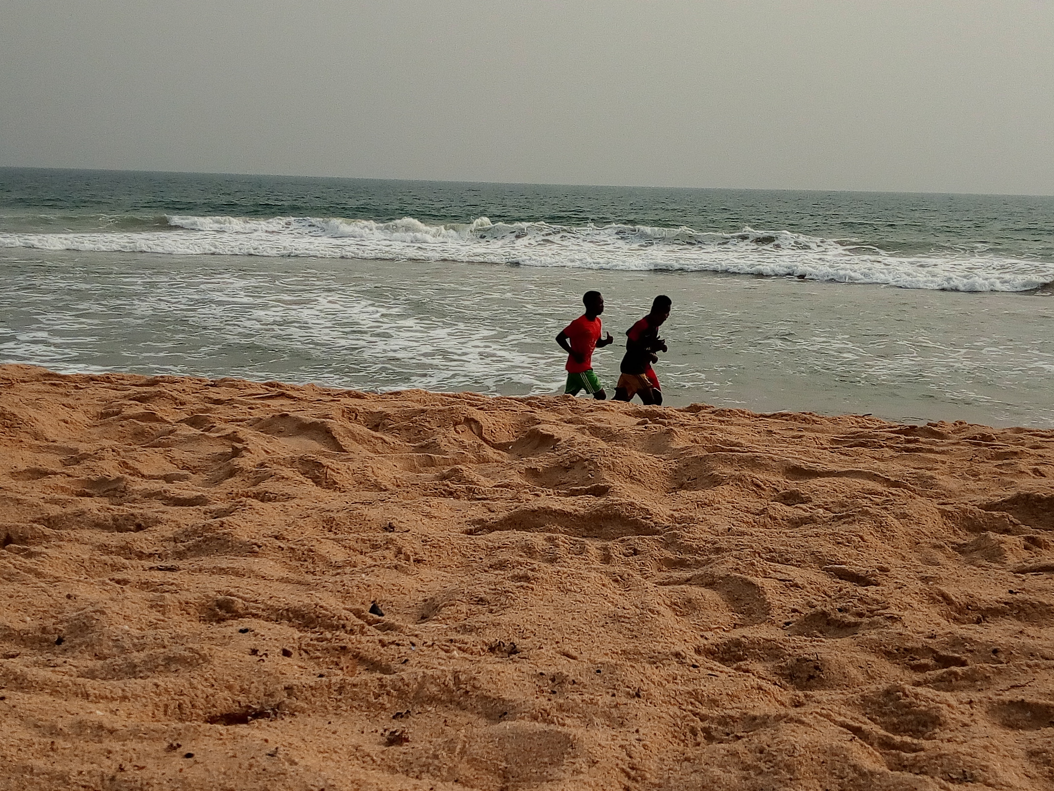 Petites foulées à la plage de Fidjrossè Cotonou Bénin un apès-midi